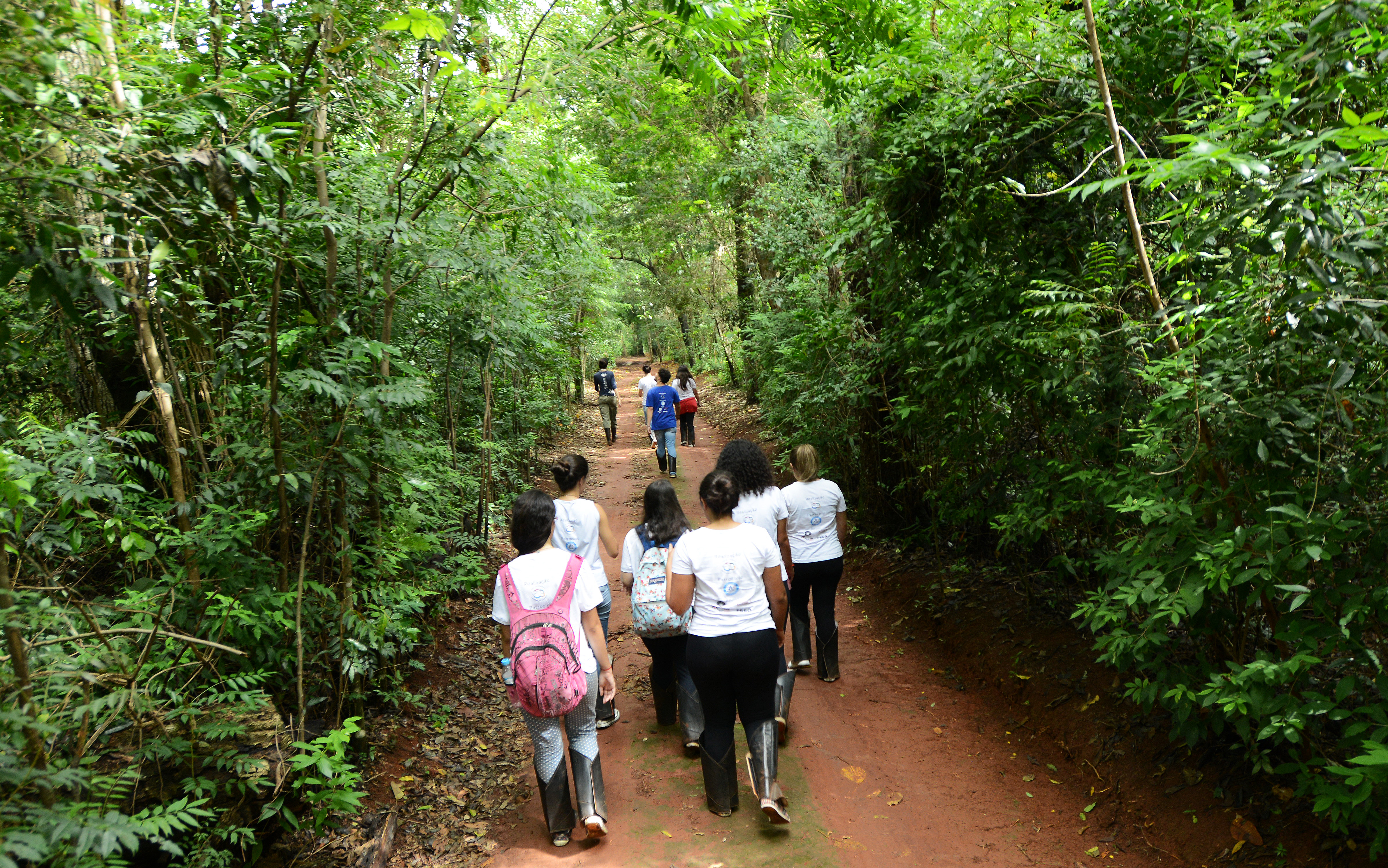 Foto Carlos Bassan